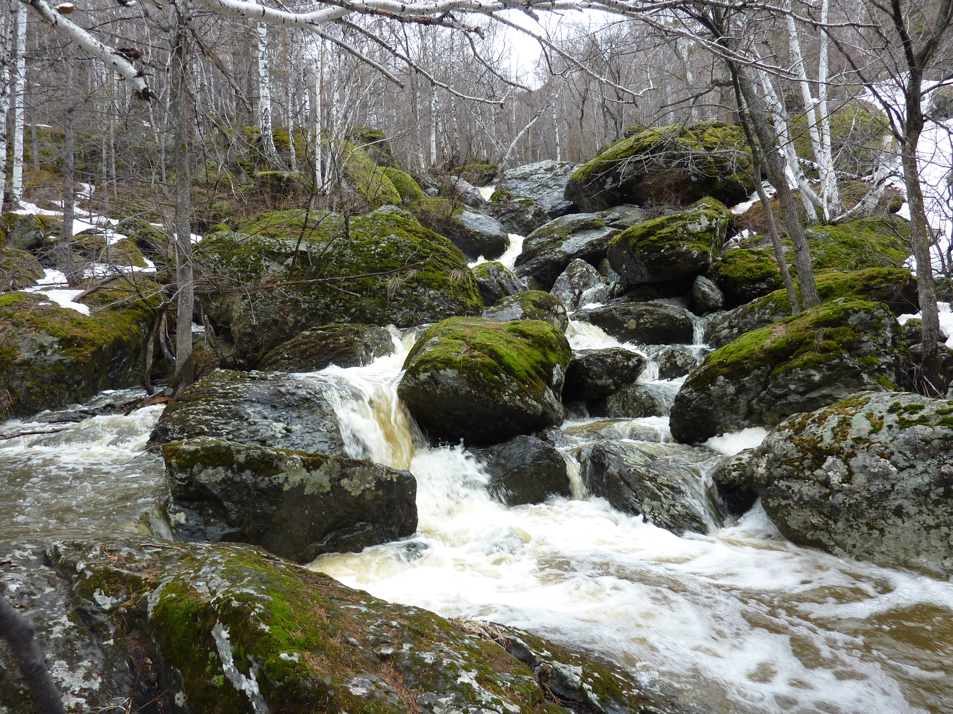 Водопады на ручье Могак